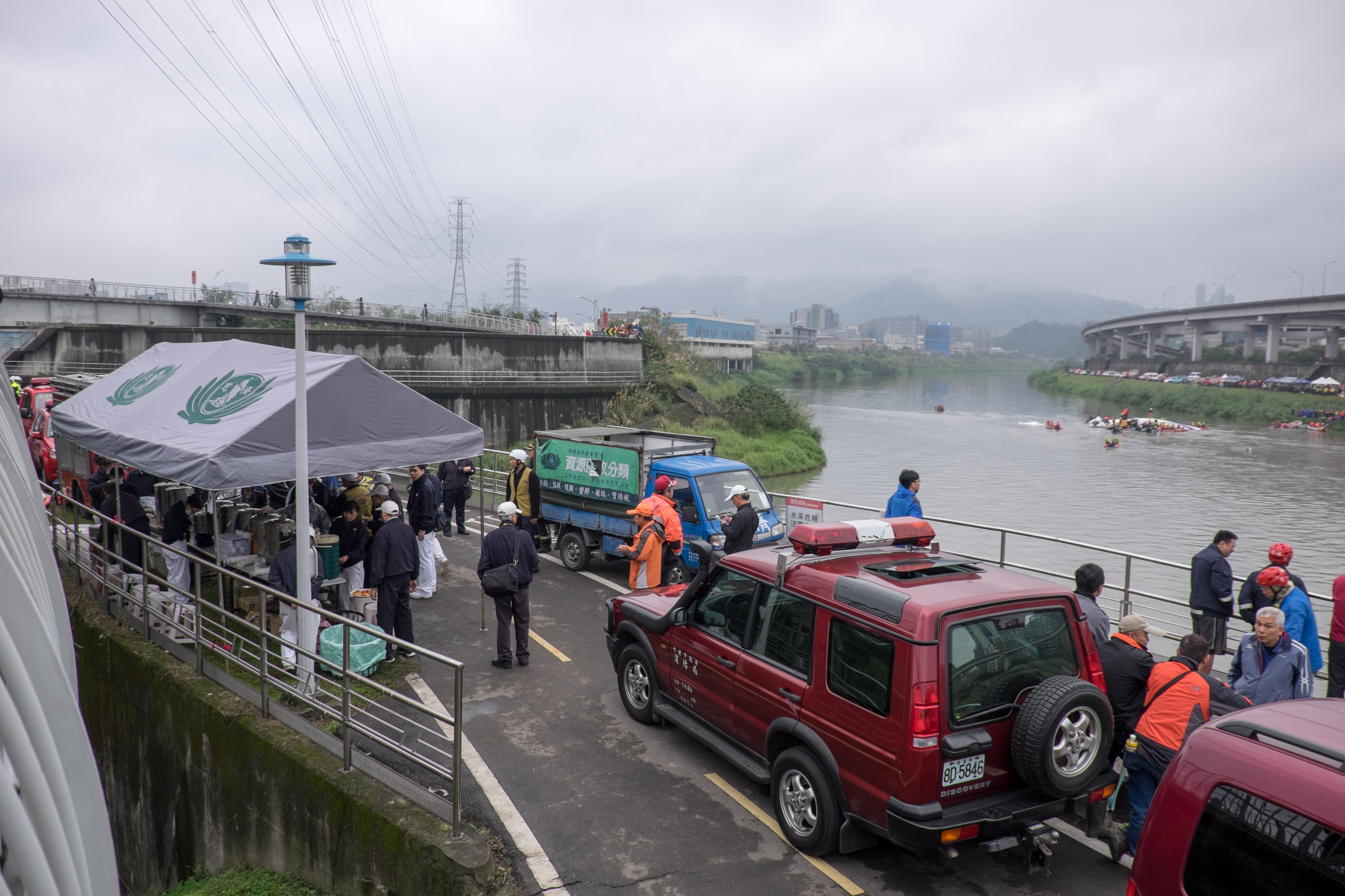 復航GE235班次事故救援現場，提供救難人員熱食、熱飲的慈濟義工帳篷，攝於臺北市內湖區內溝溪與基隆河合流口西岸。